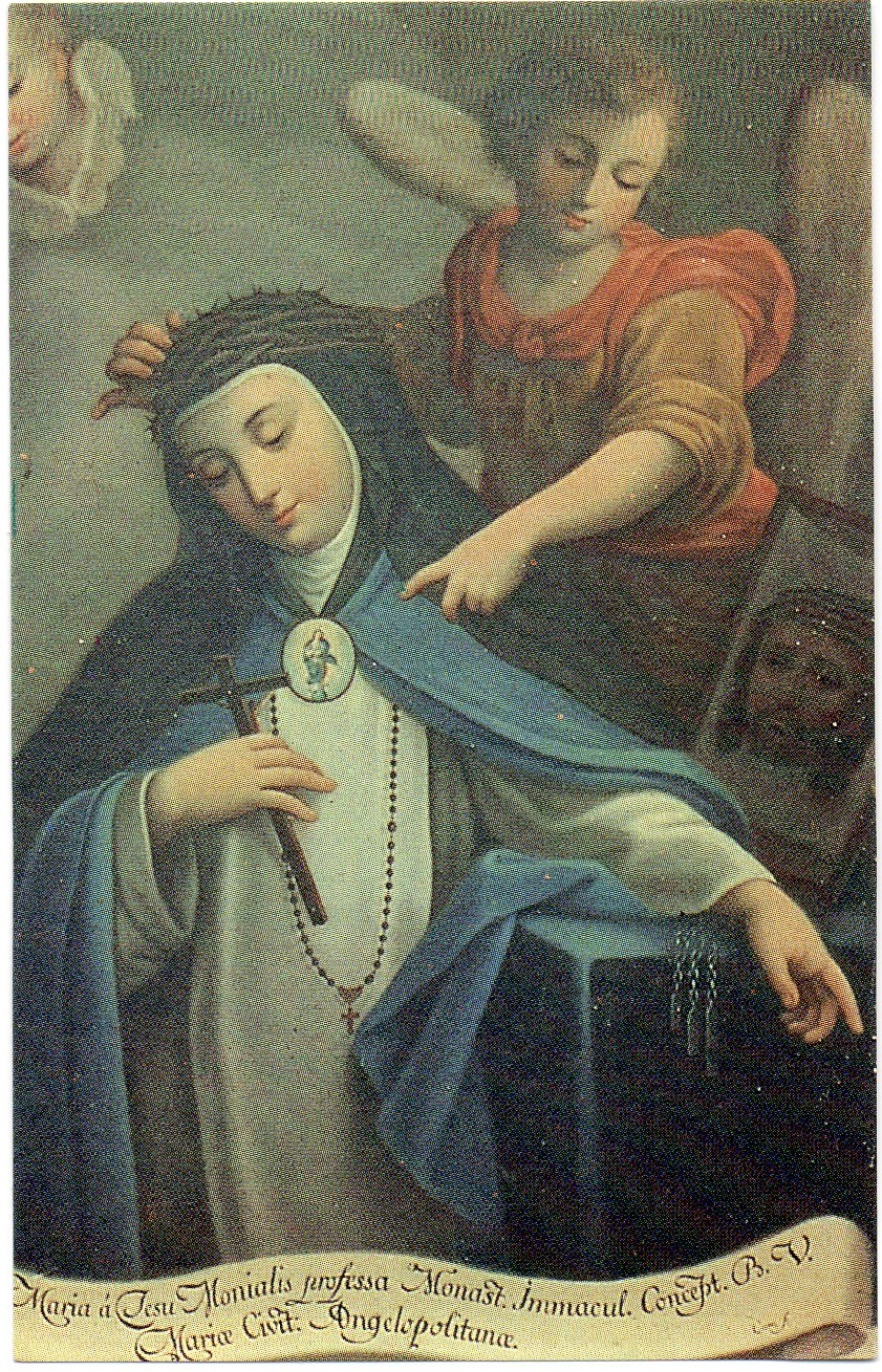 Lirio De Puebla, OIC - Federación Santa Mª de Gpe - Monasterio de la Inmaculada Concepción de la Puebla de los Ángeles